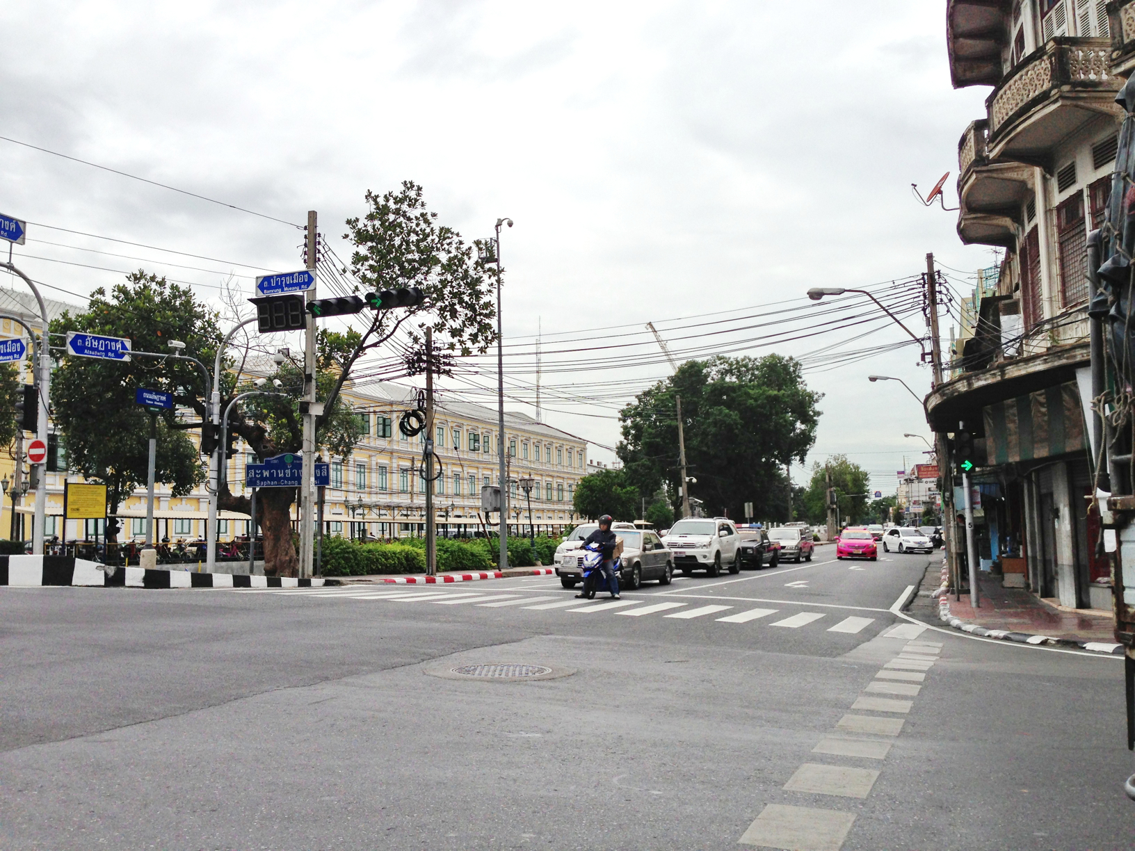 Atsadang rd, Wat ratchabophit, Bangkok